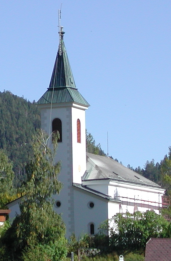 Kath. Pfarrkirche hl. Ulrich